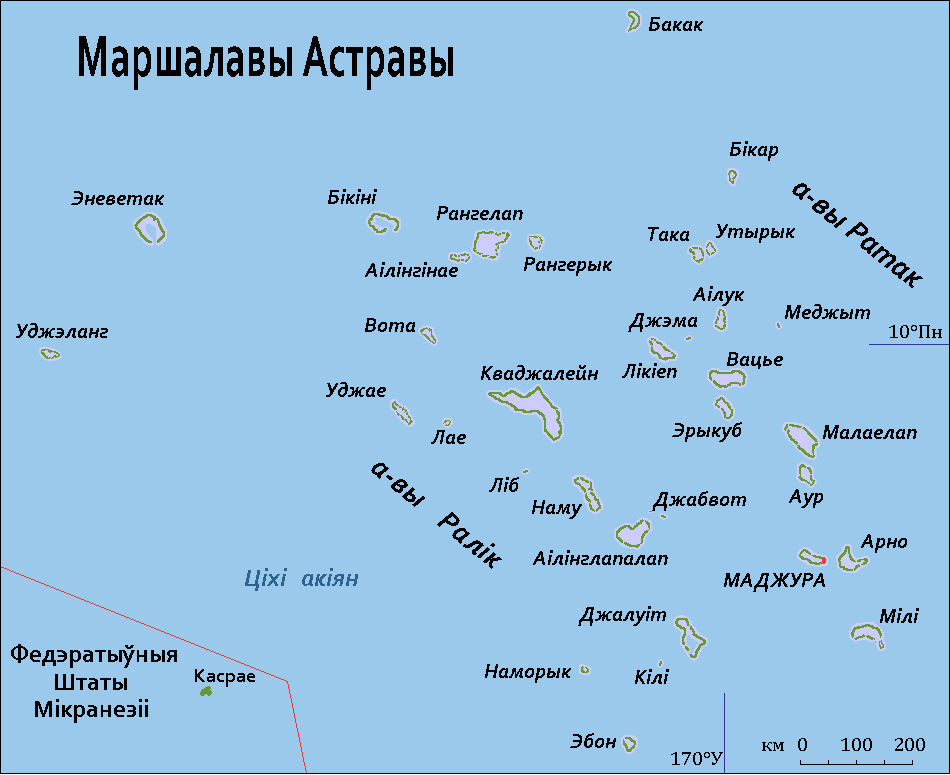 Карта Маршалавых Астравоў